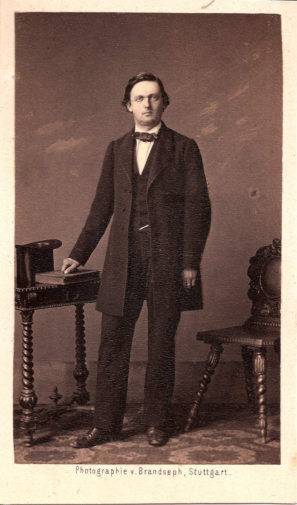 Karl von Riecke verheiratet mit Theophanie Haug, Tochter von Karl Friedrich Haug, Fotografie Friedrich Brandseph, Albumin Abzug um 1862